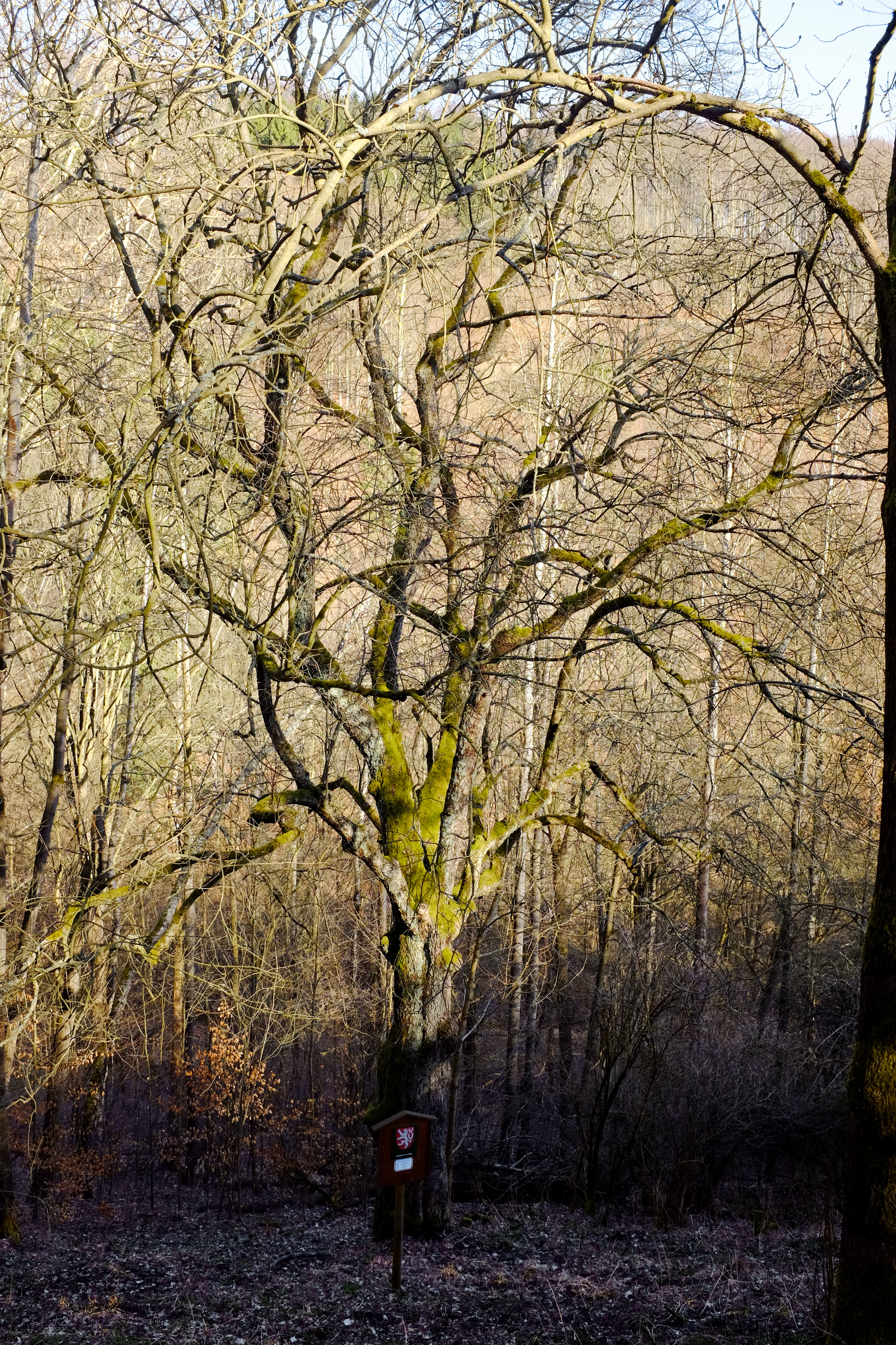 Památný strom - Břek u Horního hradu - pod Horním hradem v Horním Hradu, okres Karlovy Vary